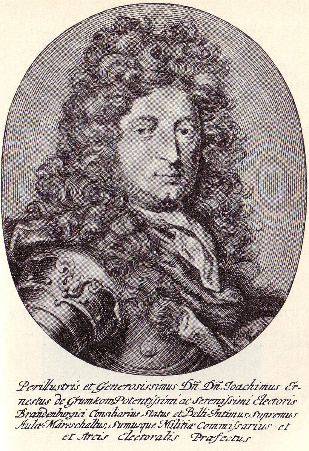 Joachim Ernst von Grumbkow (1637-1690), brandenburgischer General und Kriegsminister Sonstiges: ...